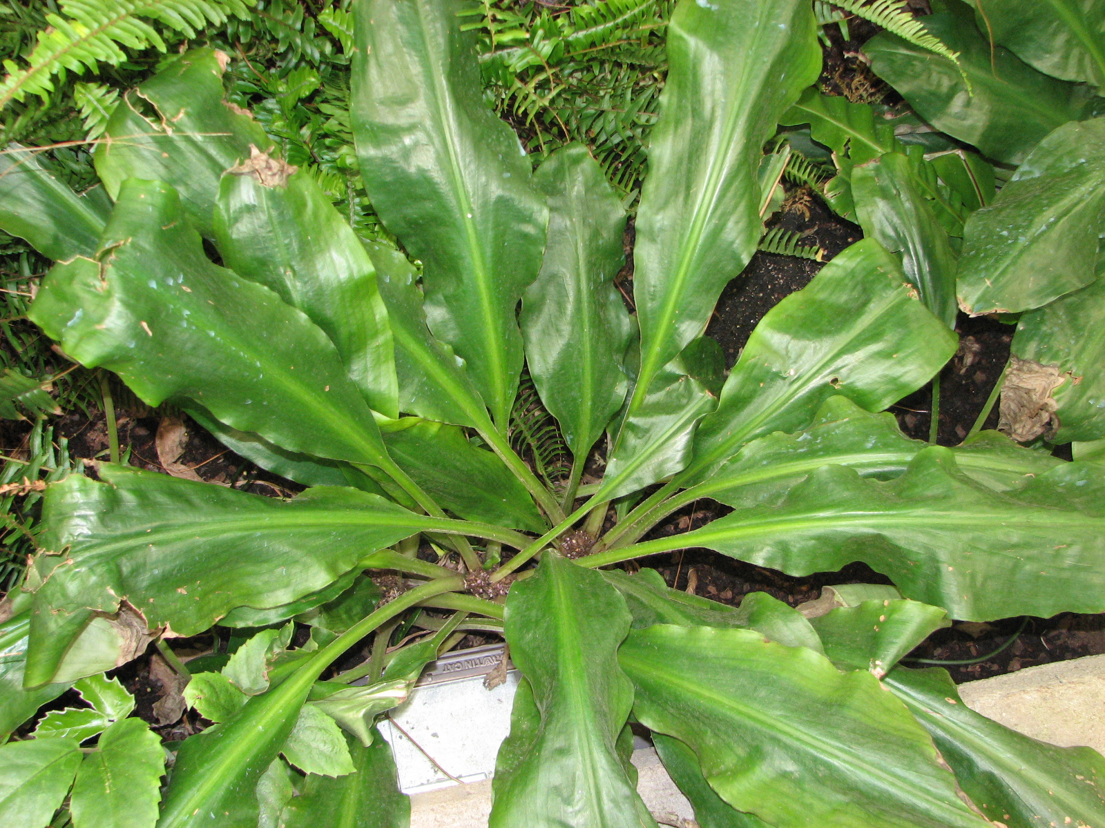 Palisota barteri at NC Zoo